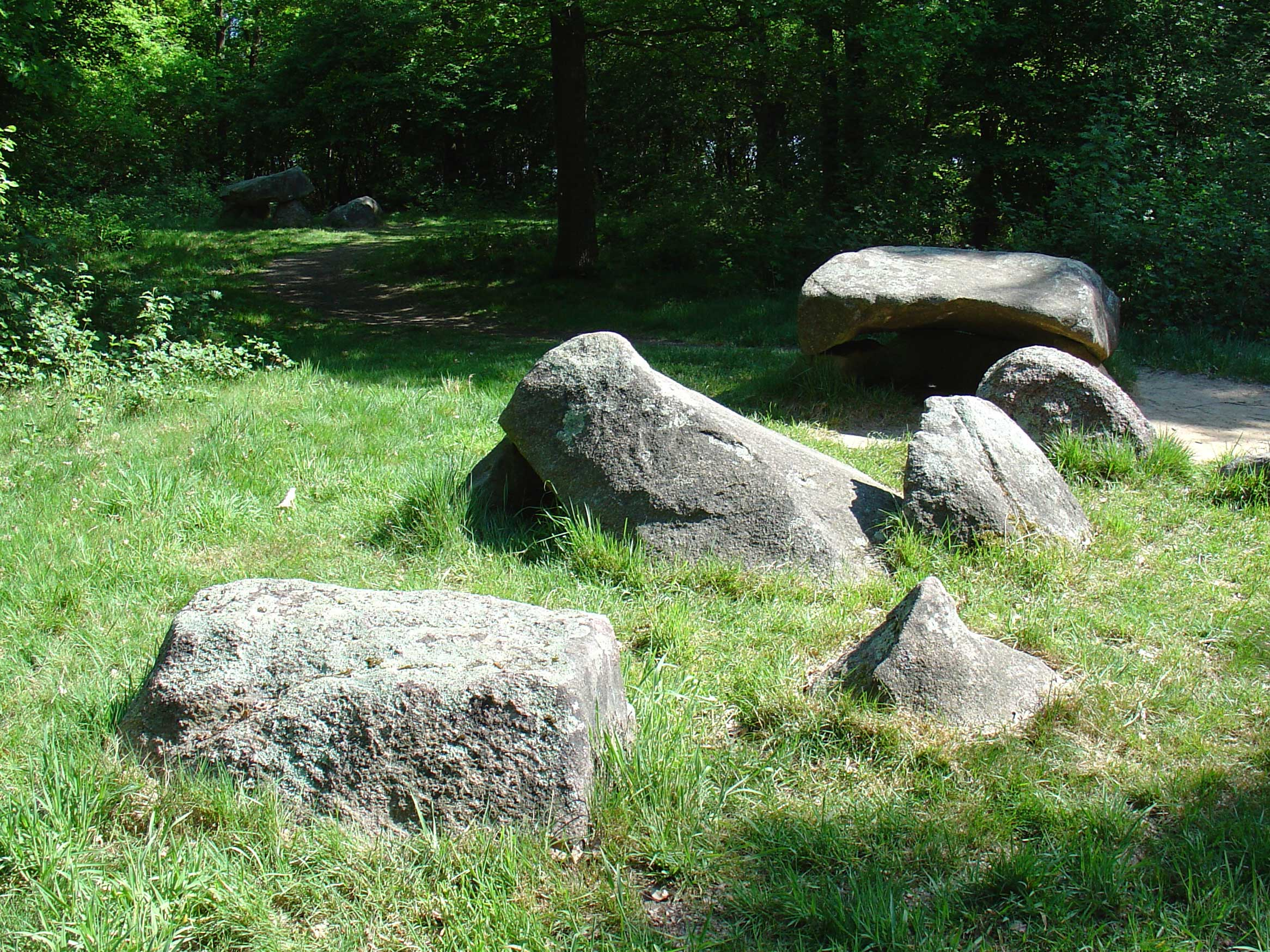 Hunebed D24 nabij Bronneger